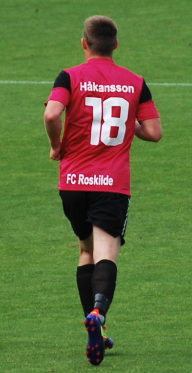 Fodboldspilleren Jesper Håkansson fra FC Roskilde. Her i 1. divisionskampen mod Viborg FF på Viborg Stadion.